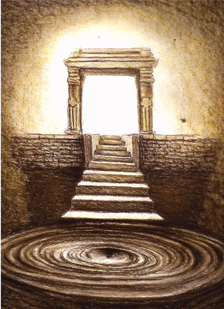 Je cherche a prendre ce qui ce voit pas avec les yeux, mais pour exprimer l’invisible, il faut employer des fragments du visible. L’homme ne peut raisonnablement concevoir une autre réalité que celle dans laquelle il vit, alors il la regarde a travers la magie et le sacré.